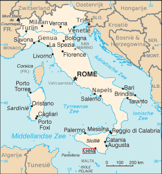 Oorspronkelijk uit CIA Factbook; vertaald in Nederlands door Danielm; omgezet in PNG door BenTels+ verbetering spelling, enkel Gela met rood gemarkeerd door mij